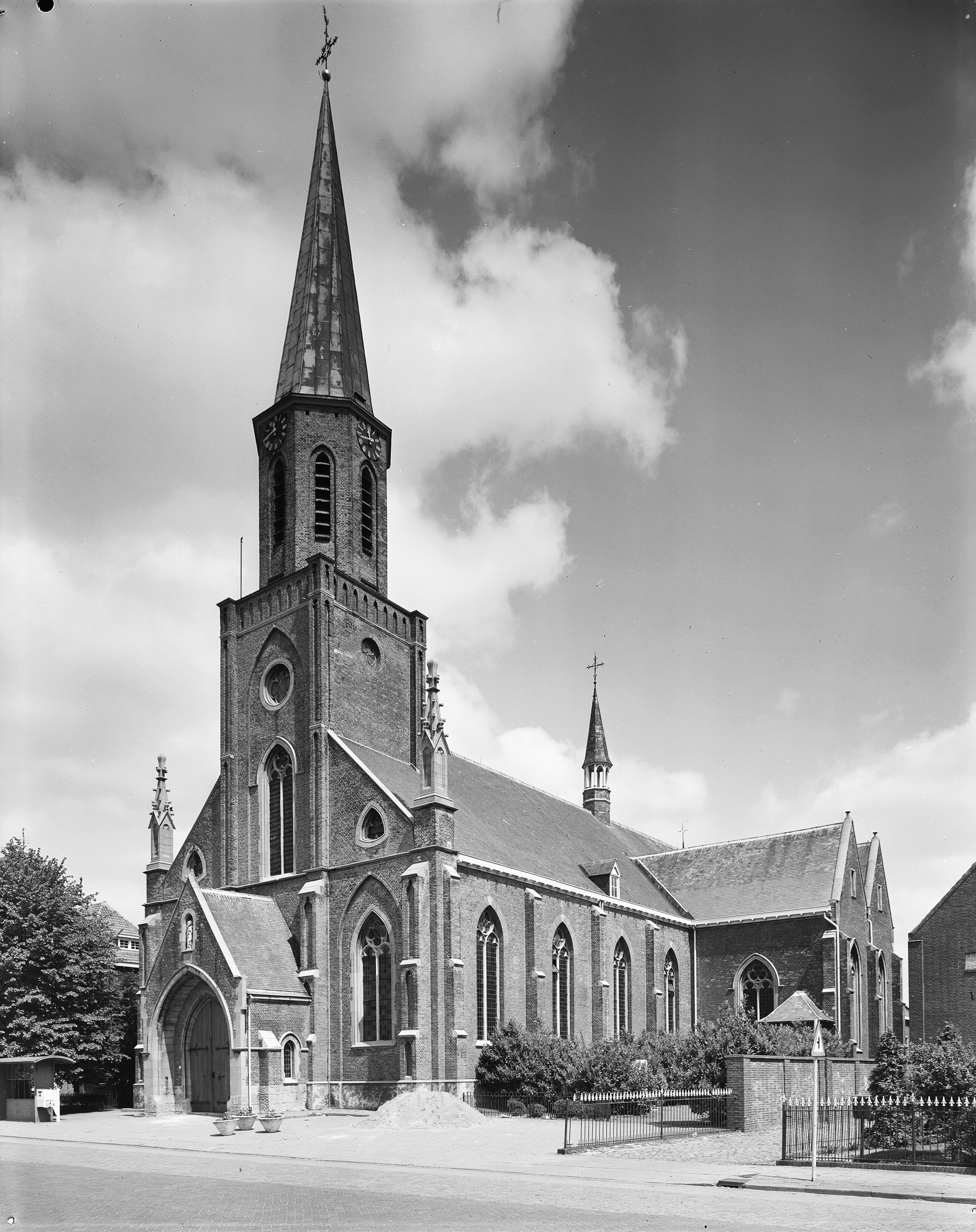 Rooms-Katholieke Kerk: exterieur zuid-west gevel